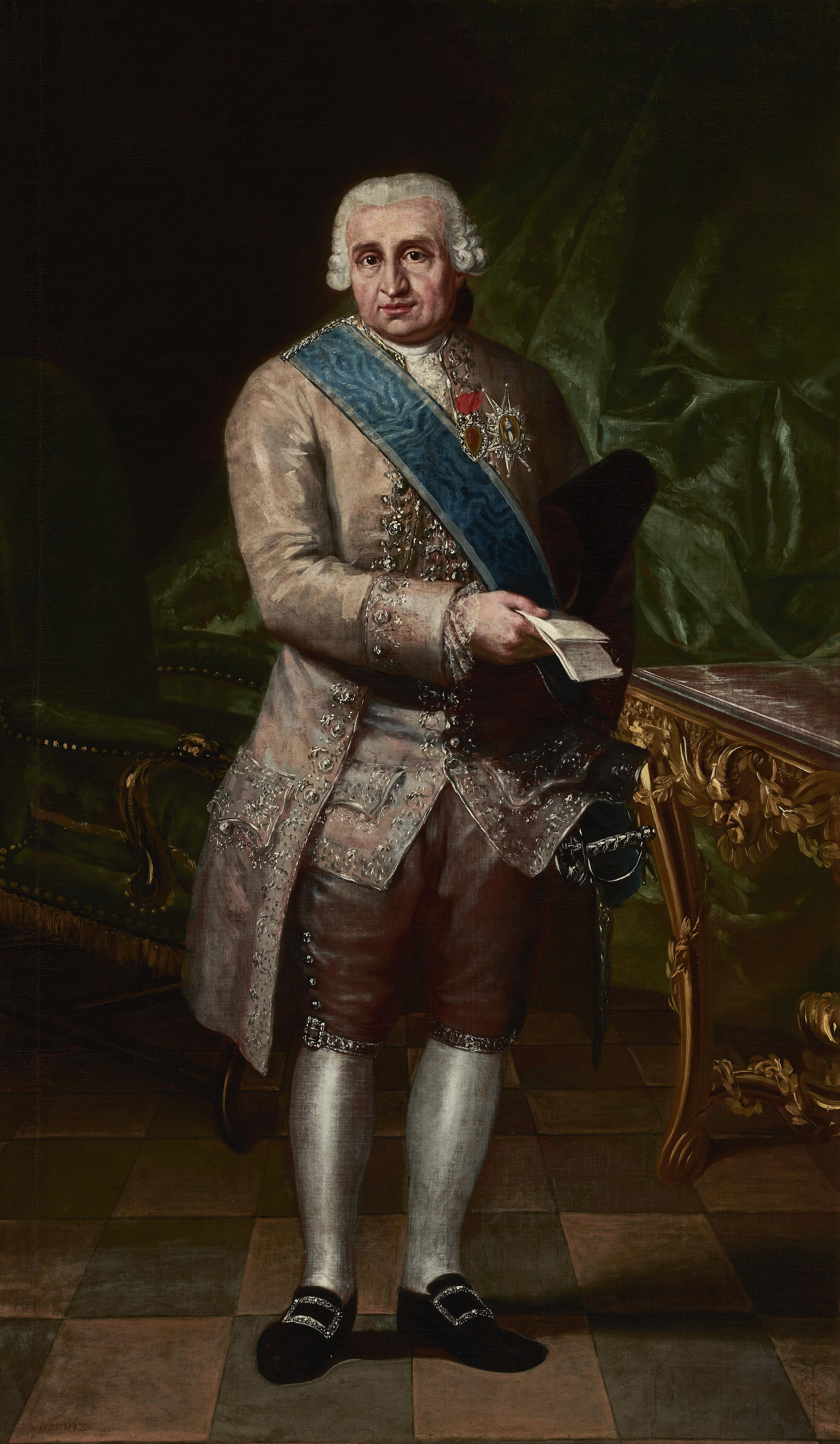 Retrato del político y aristócrata español Miguel de Múzquiz y Goyeneche (1719-1785), que fue el primer conde de Gausa y el primer marqués de Villar de Ladrón y también de secretario de Estado de Hacienda y de Guerra entre 1765 y 1785, durante el reinado de Carlos III. Y también fue caballero de la Orden de Santiago y caballero gran cruz de la Orden de Carlos III.